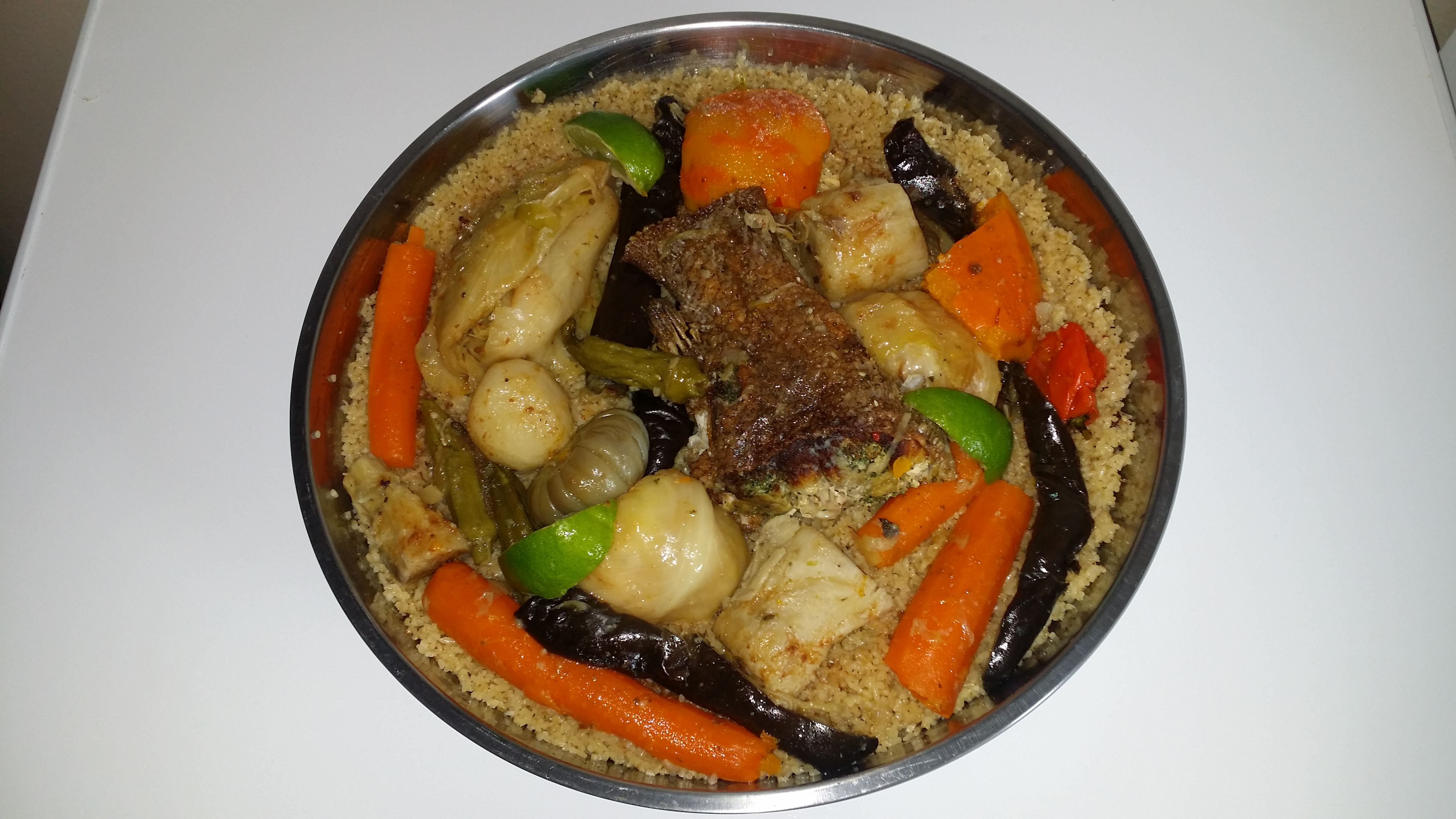 Plat national du Sénégal. Littéralement thieboudienne/thie bou djeun signifie riz au poisson dans la langue Wolf. Il est composé de riz brisé parfumé cuit dans un bouillon accompagné de poissons divers (principalement le Thiof ou Mérou et du poisson séché) ainsi que de légumes variés (carottes, chou blanc, navet, patate douce, aubergines, manioc, gombos, diakatous/aubergines amères et citron). This is an image of food from Senegal